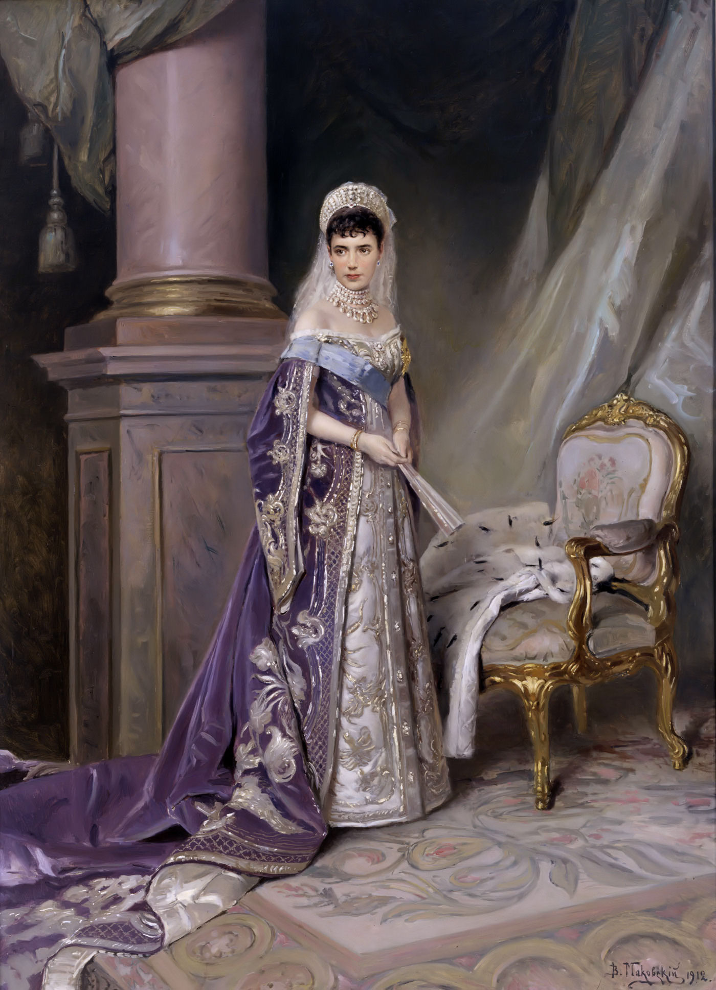 В. Е. Маковский Портрет императрицы Марии Федоровны. 1912 Справа внизу: В. Маковскiй 1912 Пост. не позднее 1940 ЖБ-1932